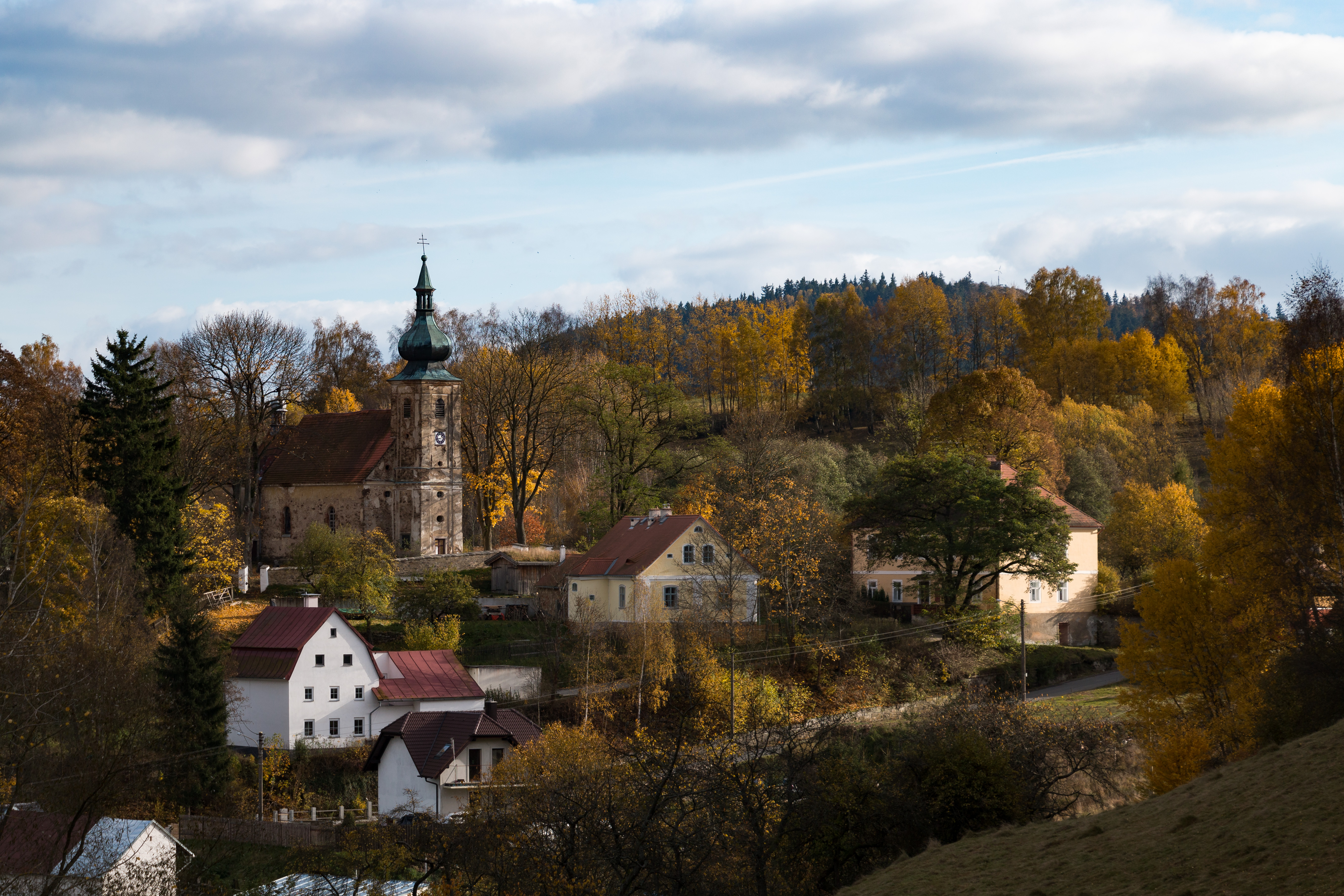 Pohled na kostel ze severozápadu.